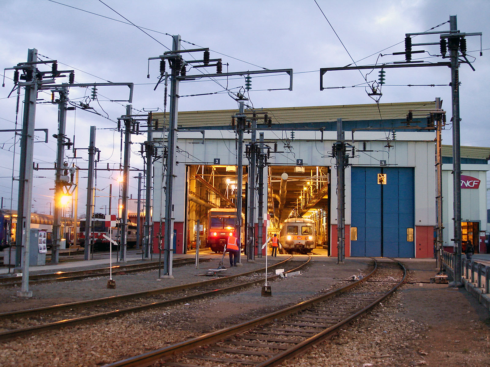 Bâtiments du technicentre Paris Nord-Joncherolles, Villetaneuse, Seine-Saint-Denis, France.